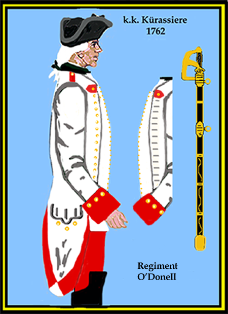 Österreichisches Kürassier-Regiment „O'Donell“ (Aus: L.& F. Funcken - „L'Uniforme et les Armes des soldats de la guerre en dentelle II“) Castermann (Tournai 1976)